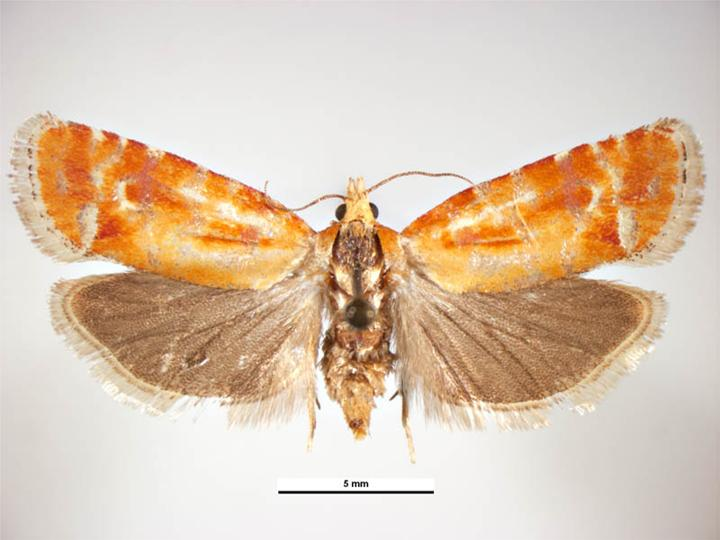 Rhyacionia buoliana female